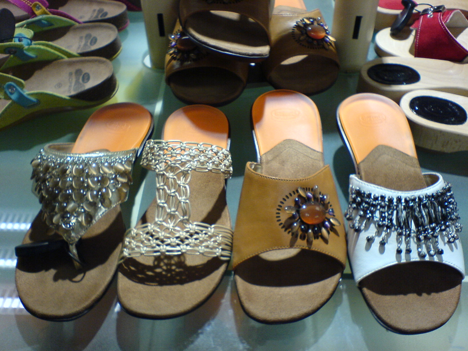 Pantaletten